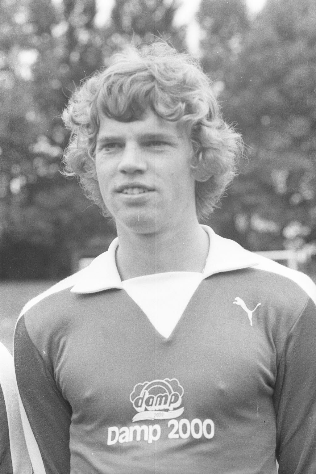 Fußballspieler von Holstein Kiel in der Saison 1978/79.